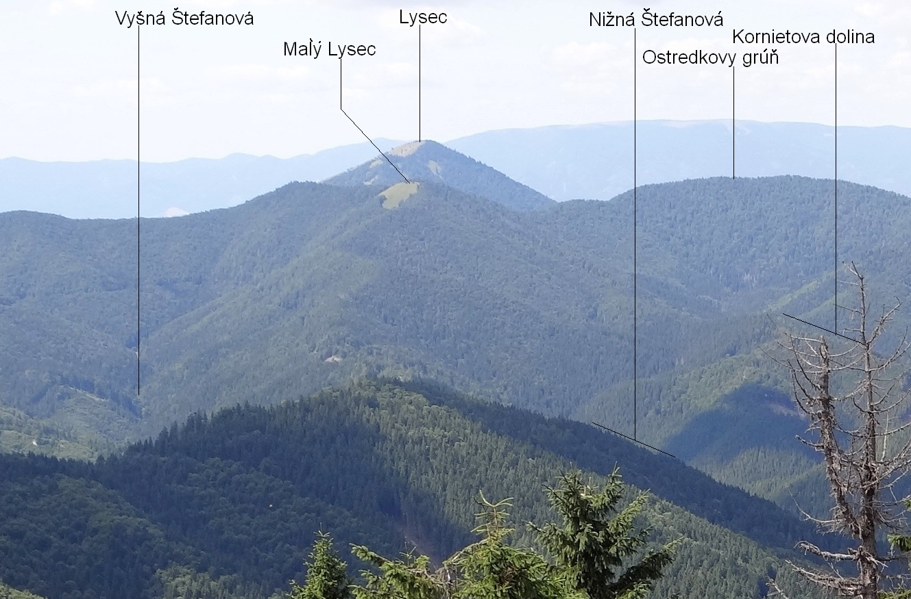 Malý Lysec, Lysec. View from Tanečnica